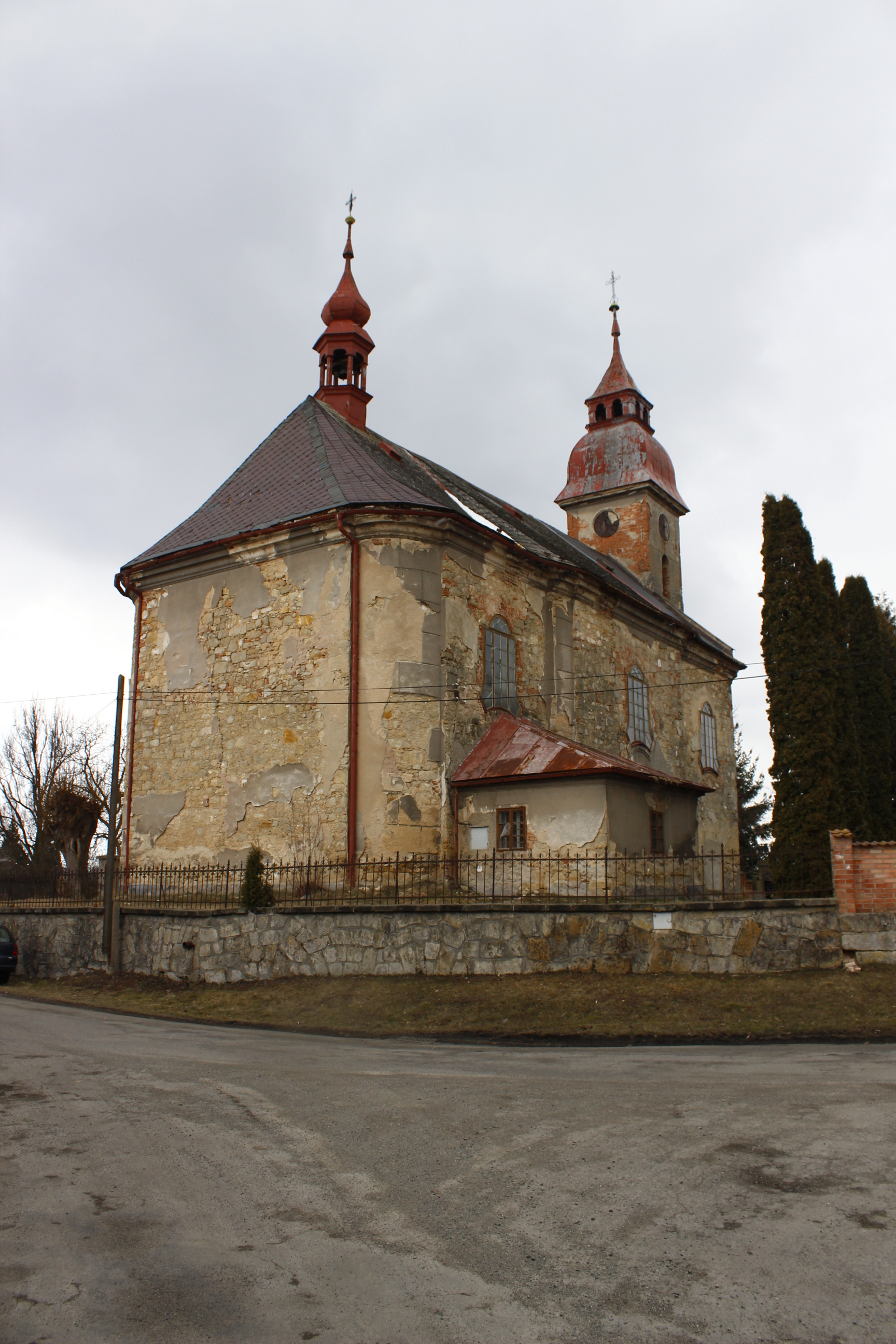 Kostel svatého Františka Serafinského v Kováni.